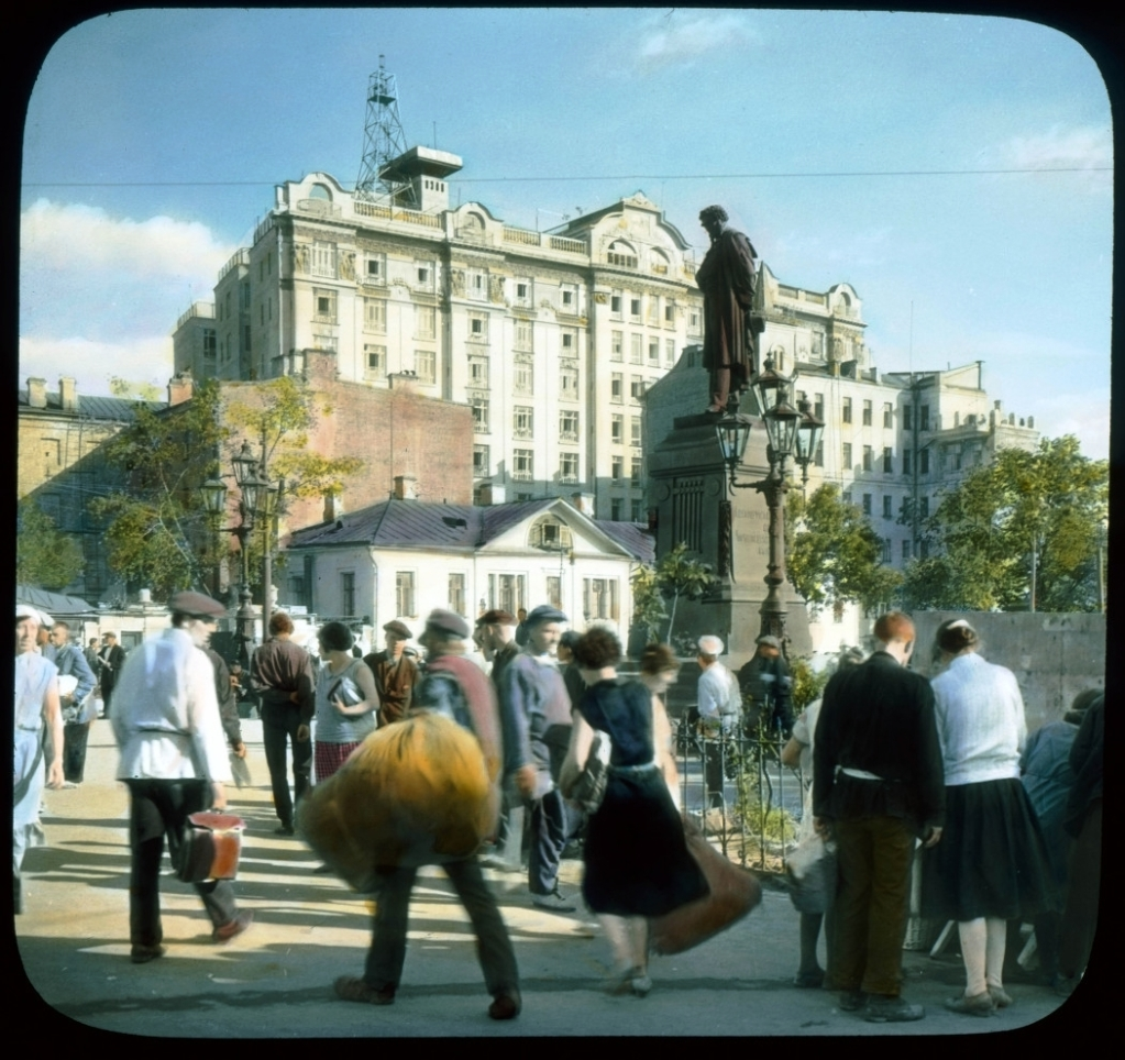 Москва. Страстная площадь